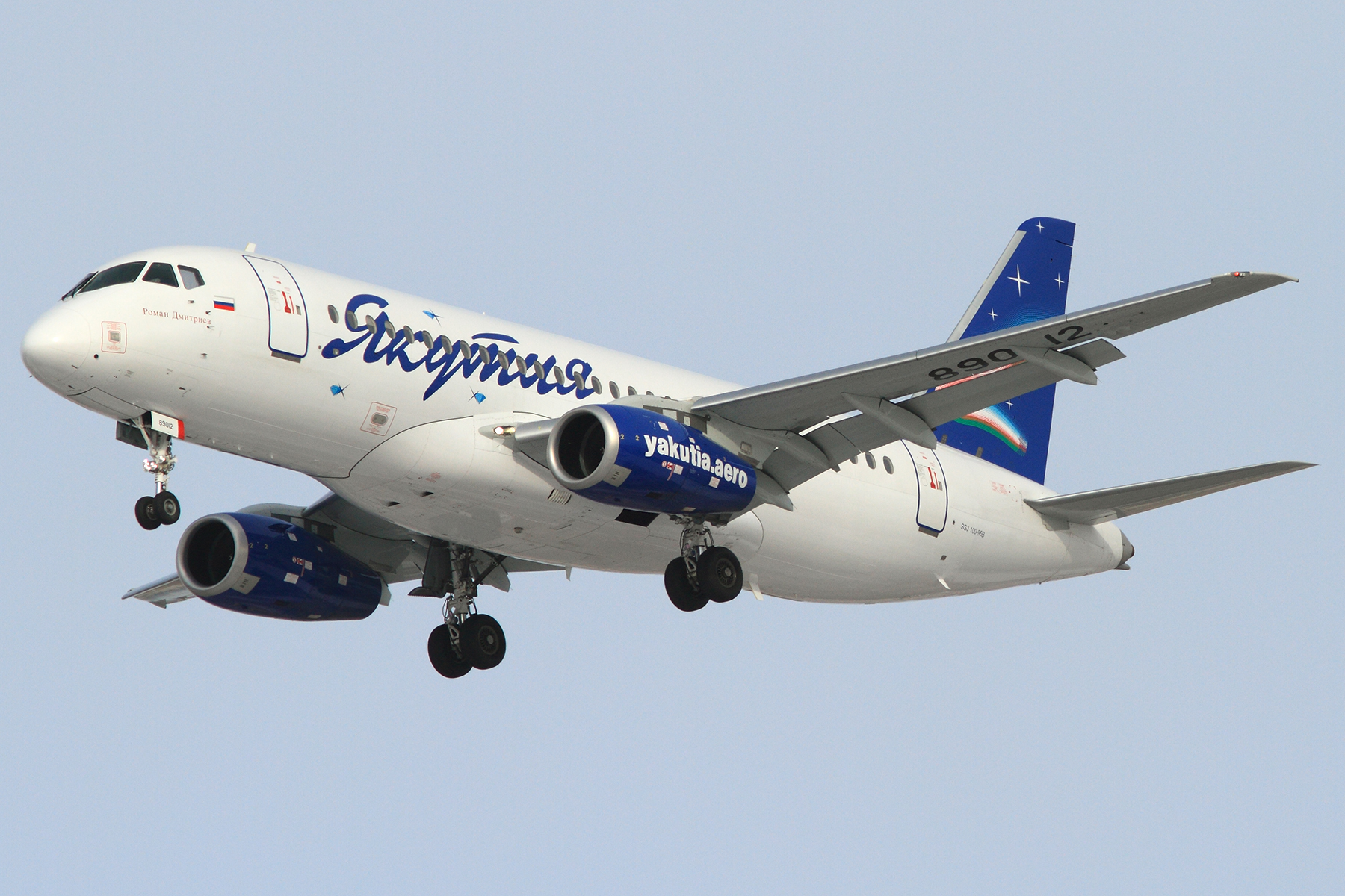 Yakutia Airlines Sukhoi SuperJet 100